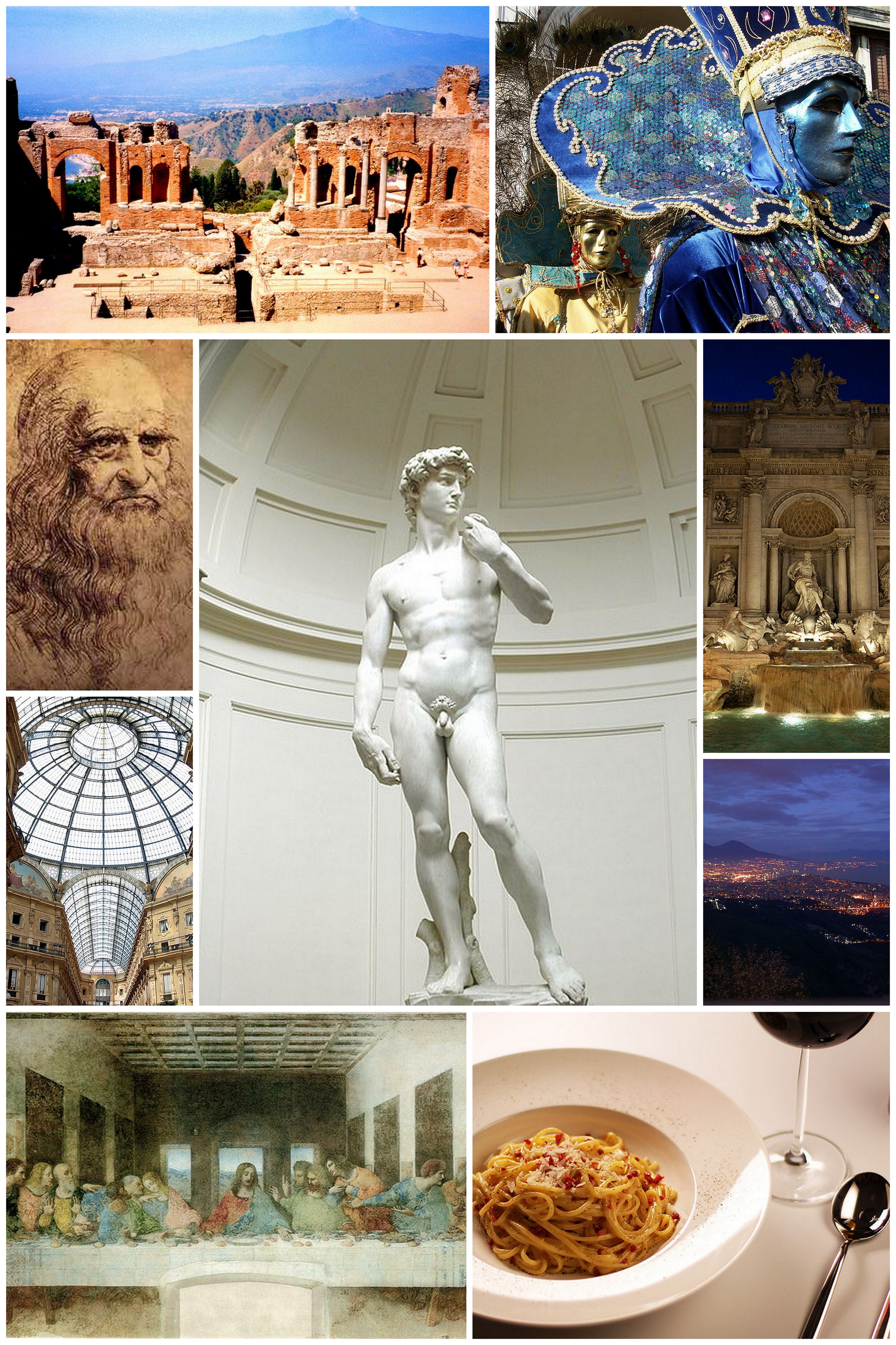 Collage di varie foto riguardanti la cultura dell'Italia.